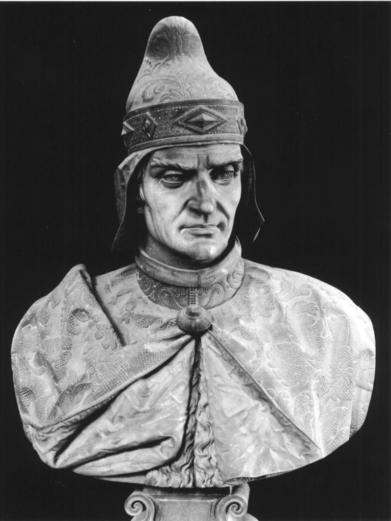 Andrea Dandolo, opera di Lorenzo Larese Moretti del 1861. Il busto fa parte del Panteon Veneto, conservato presso Palazzo Loredan di Campo Santo Stefano a Venezia.